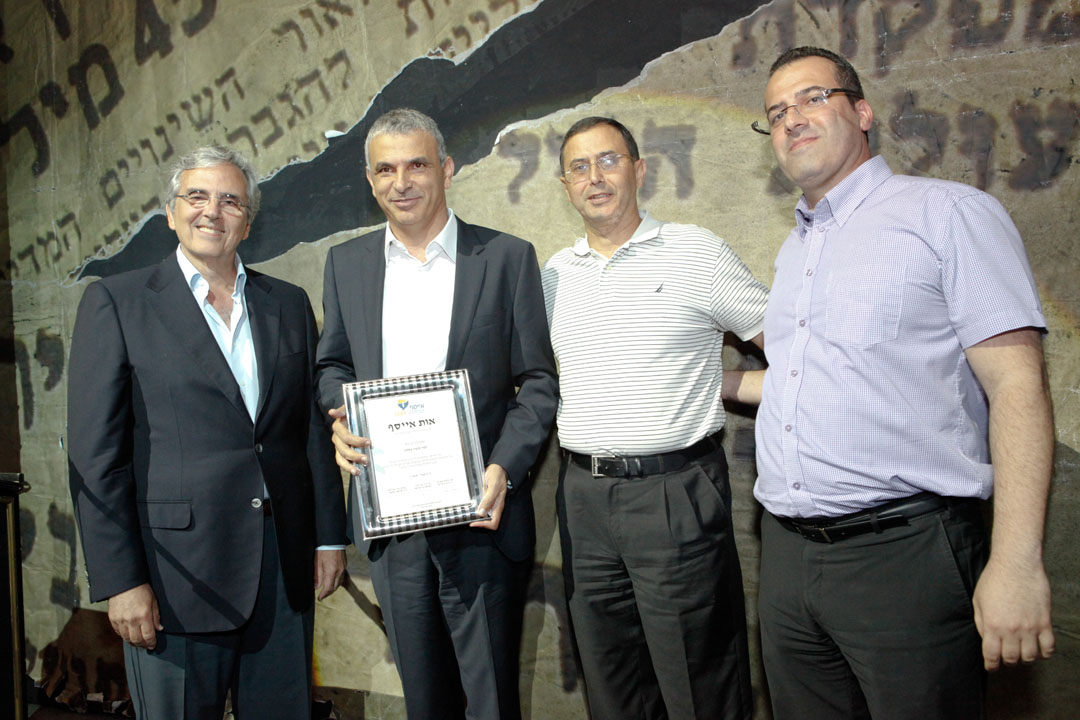 הענקת אות אייסף למר משה כחלון צילום - עופר עמרם